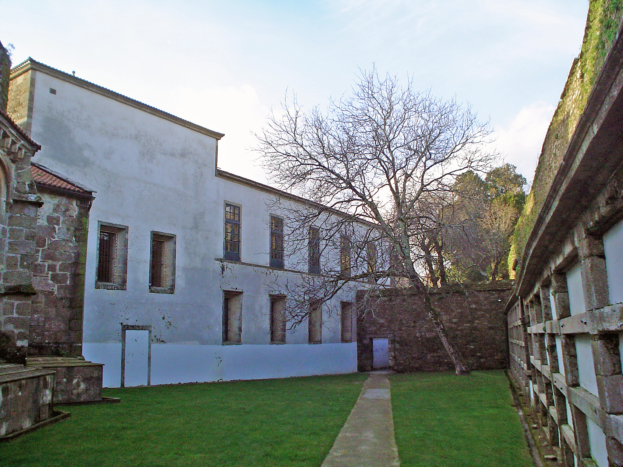 Recuncho do parque de San Domingos de Bonaval - Santiago de Compostela